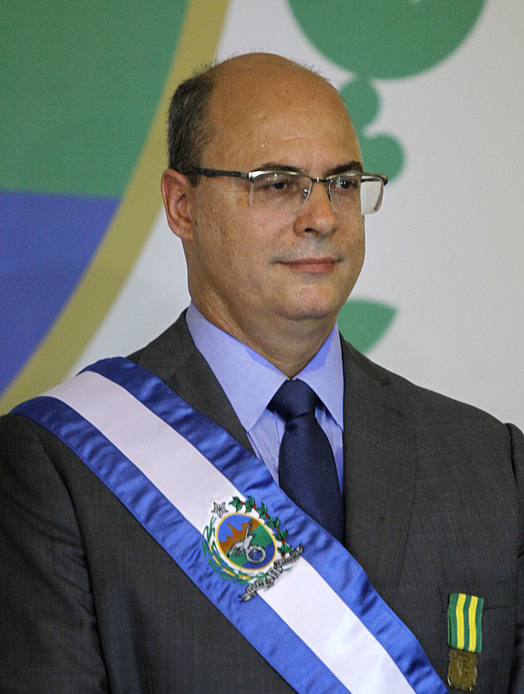 RJ 02-01-2018. Posse do Governador Wilson Witzel no Palácio Guanabara.Fotógrafo: André Gomes de Melo